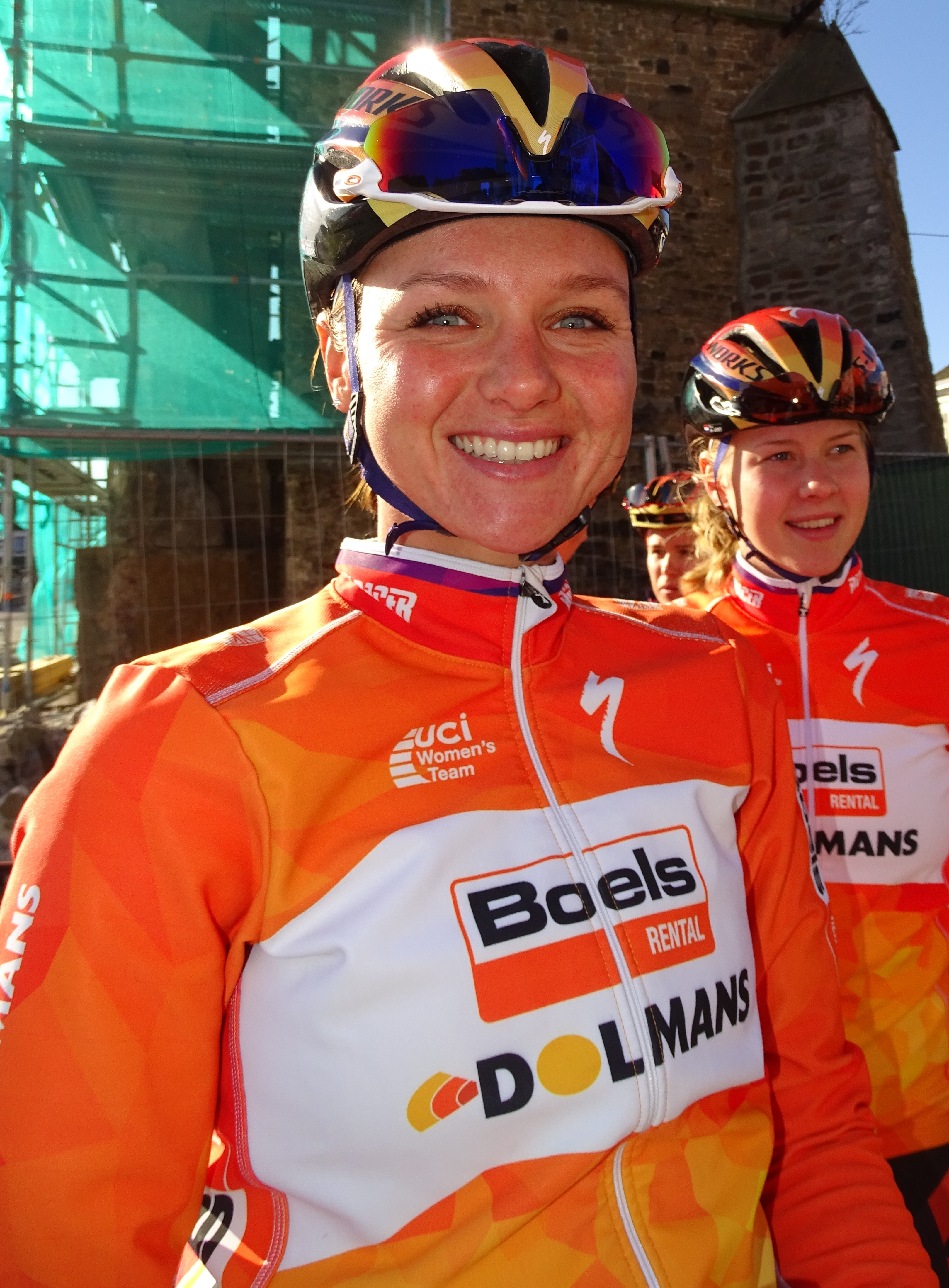 Reportage réalisé le mercredi 2 mars à l'occasion du départ du Samyn des Dames 2016 et du Samyn 2016 à Quaregnon, Belgique.